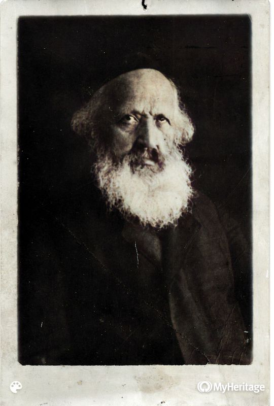 הרב משופרון